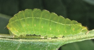 Acronicta fallax